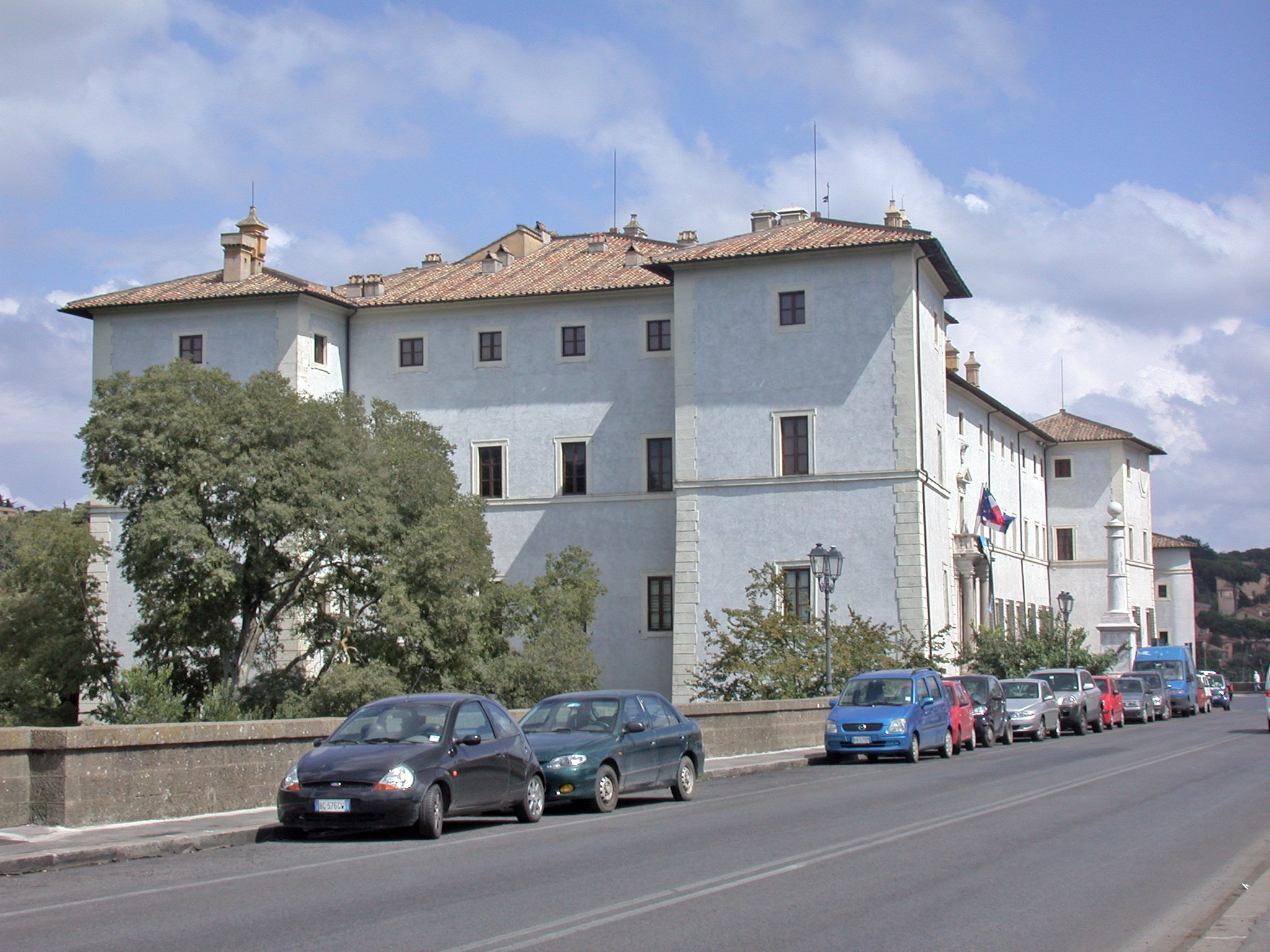 Ariccia (provincia di Roma, Lazio, Italia), palazzo Chigi dal "ponte di Ariccia".